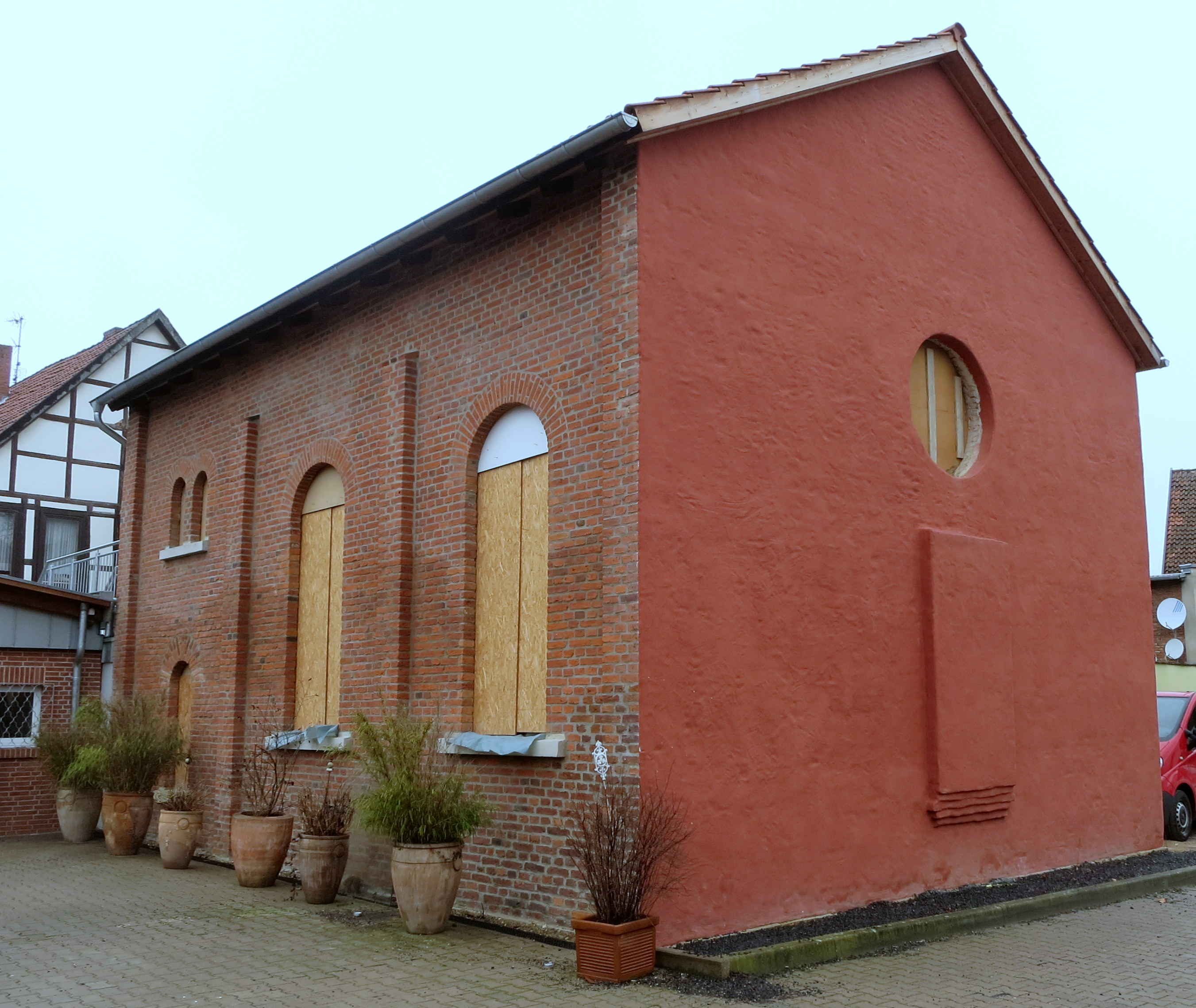 Diese profanierte Synagoge wird ein Lern- und Gedenkort in Stadthagen.